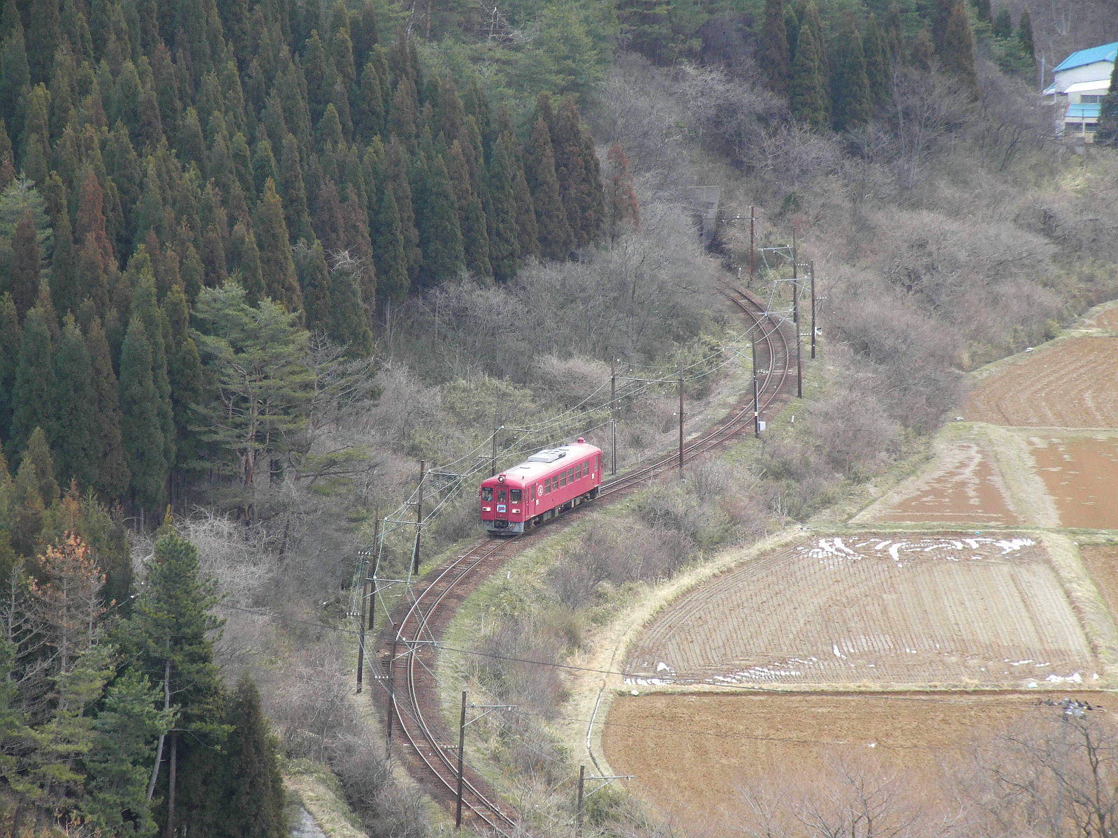 Kurihara Denen Railway. Uguisuzawa, Kurihara, Miyagi prefecture, Japan.